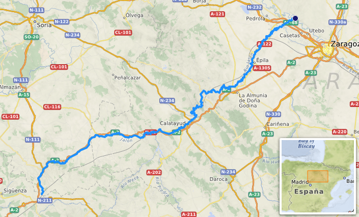 carte réalisée sur umap [1] This map may be incomplete, and may contain errors. Don't rely solely on it for navigation.